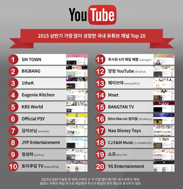 2015년 가장 많이 성장한 유튜브 채널에 대한 정보이다.